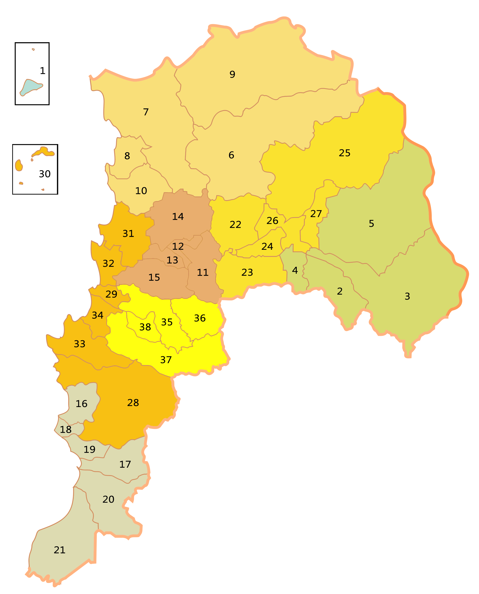 Región de Valparaíso Números indican comunas Colores indican provincias